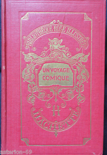 Magdeleine du Genestoux, Un voyage comique, Bibliothèque rose, 1939, illustrations d'Henri Fournier.